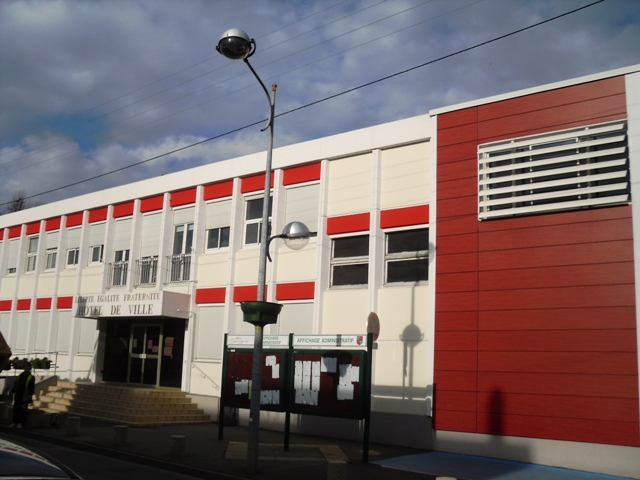 Hôtel de ville de Grigny (91)